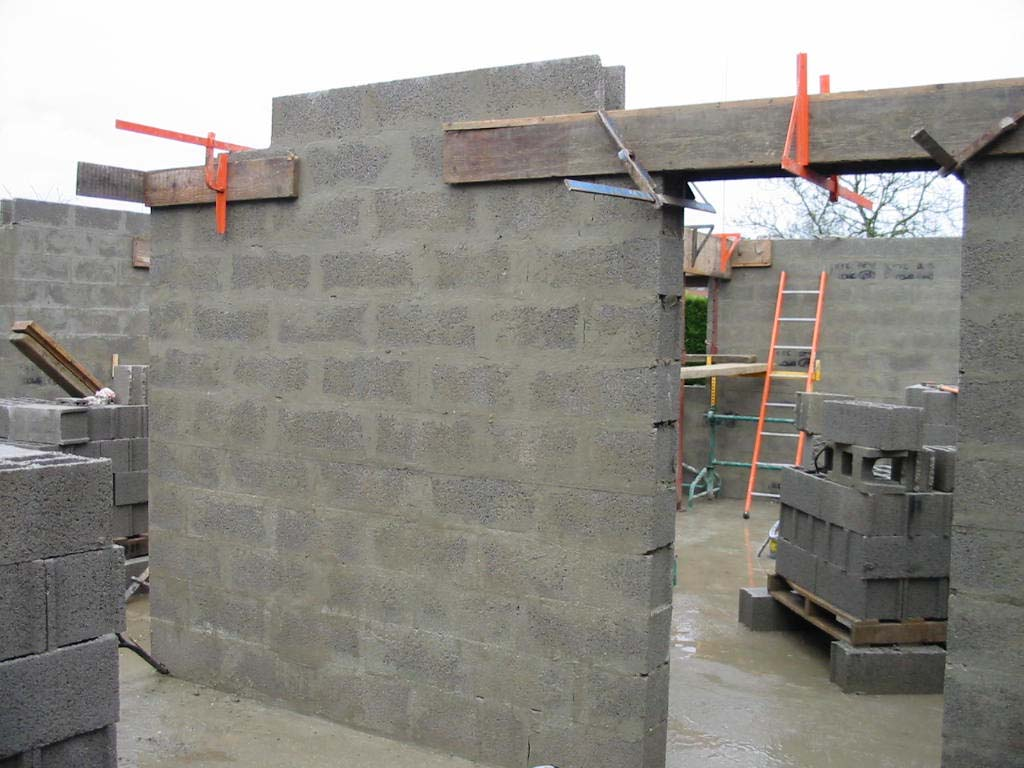 Exemple d'une construction en blocs de béton (élévation intérieure) Auteur: PhY